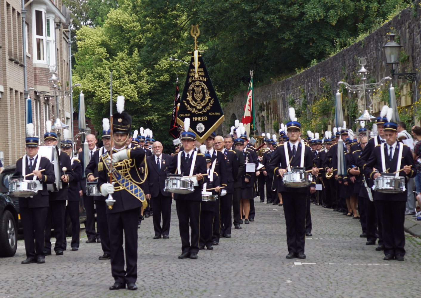 Heiligdomsvaart Maastricht, 2e Ommegang. Koninklijke Harmonie St Cecilia Mheer.